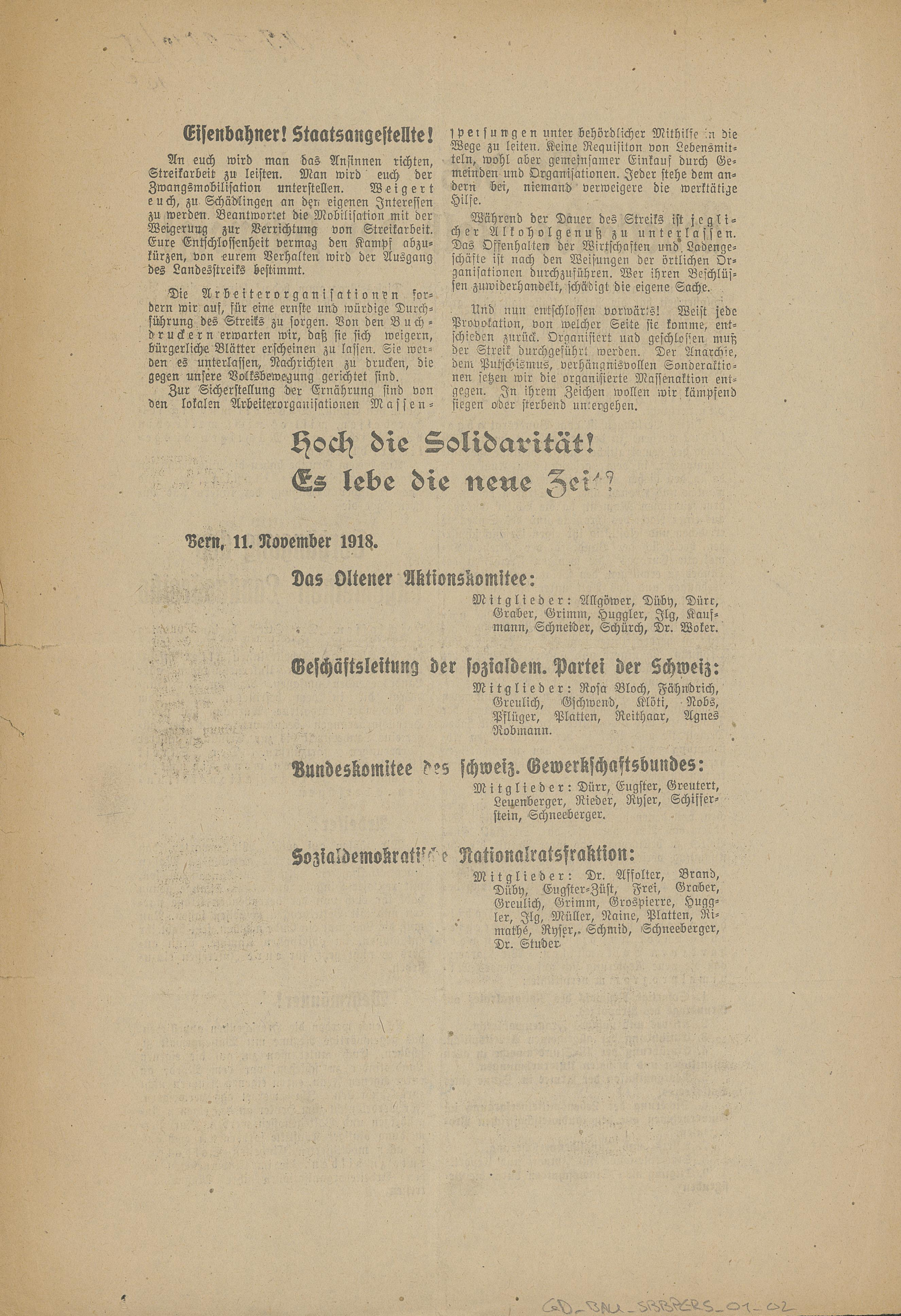 Flugblatt des Streikkomitees zur Verhängung des allgemeinen Landesstreiks (Schweiz), Seite 2. PDF der beiden Seiten in hoher Auflösung: File:SBB Historic - GD BAU SBBPERS 01 02 01 - Flugblatt des Streikkommitees zur Verhaengung des allgemeinen Landesstreiks.pdf